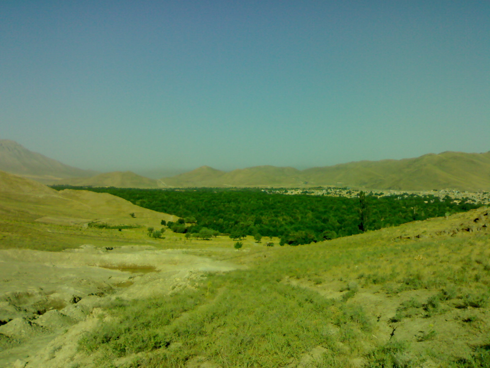 منظره ای از اسل کرهرود